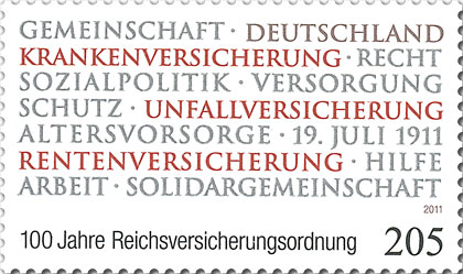 Stamp description / Briefmarkenbeschreibung